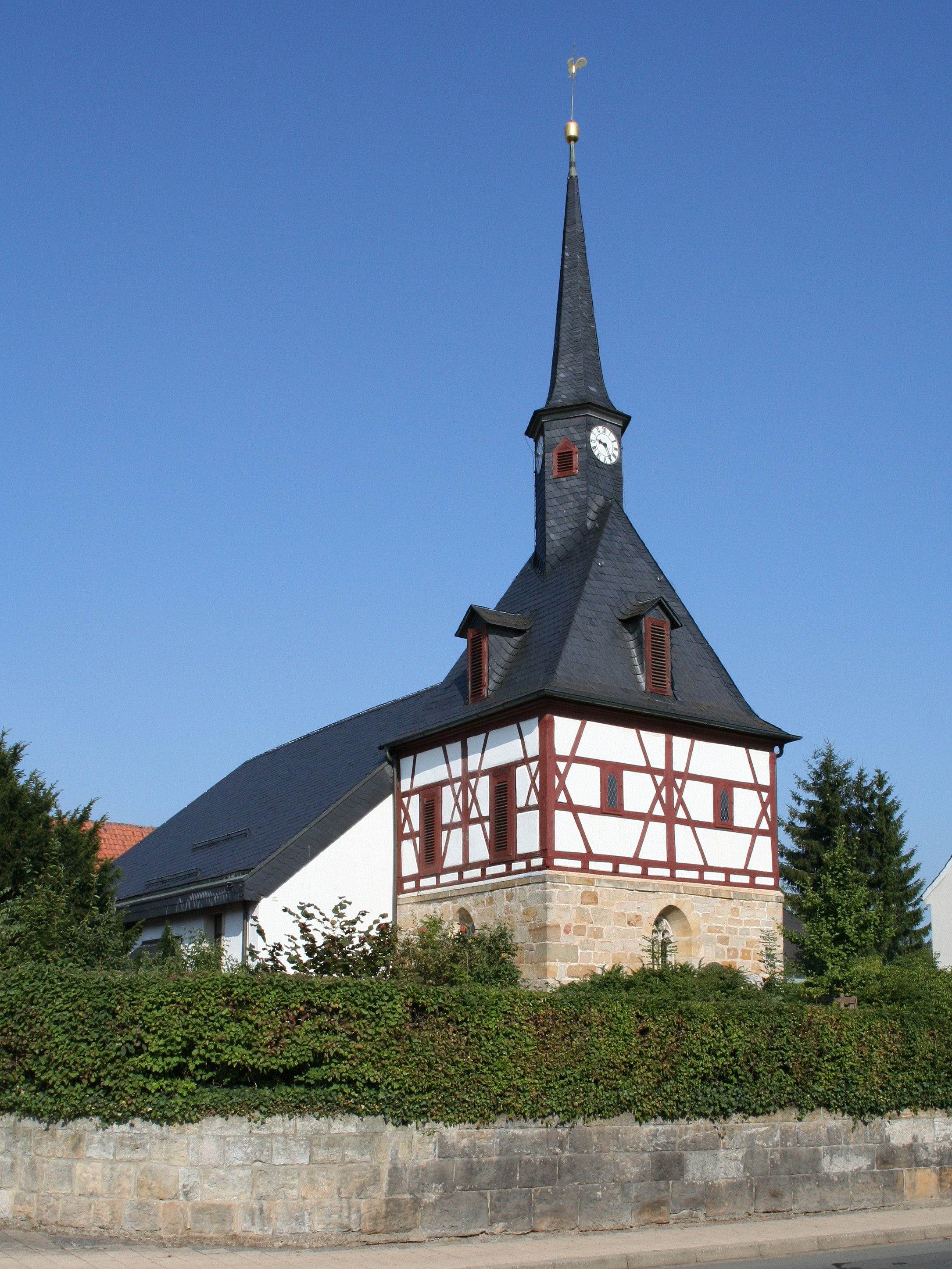 ev. Kirche Weidhausen evangelische Stadtkirche in Weidhausen, Landkreis Coburg